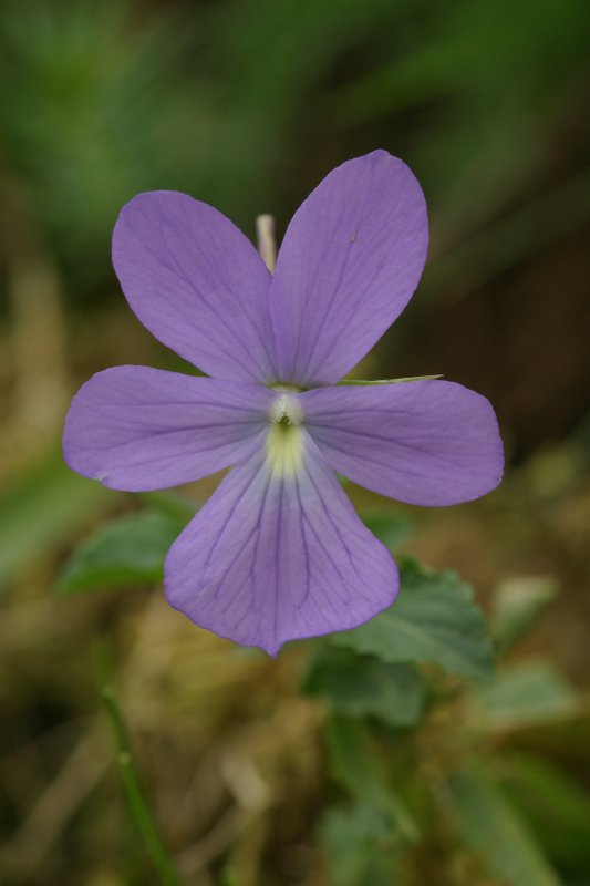 Viola cornuta, Vallée de Lesponne (65)